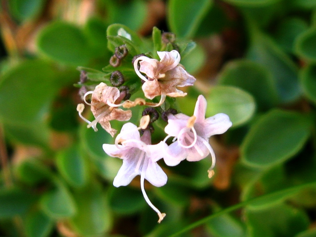 Infiorescenza, in parte sfiorita, di Valeriana supina Ard.